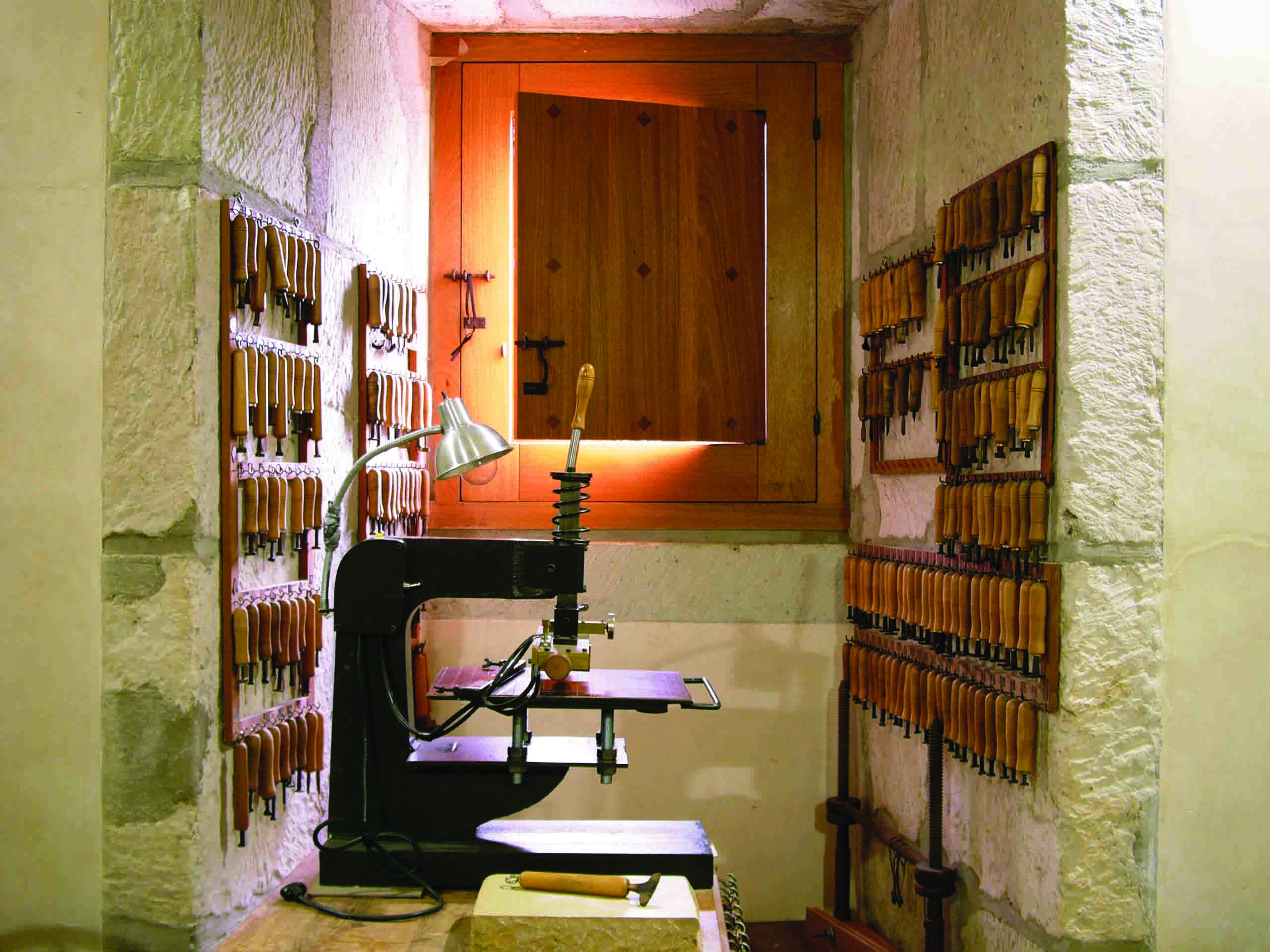 Prensa